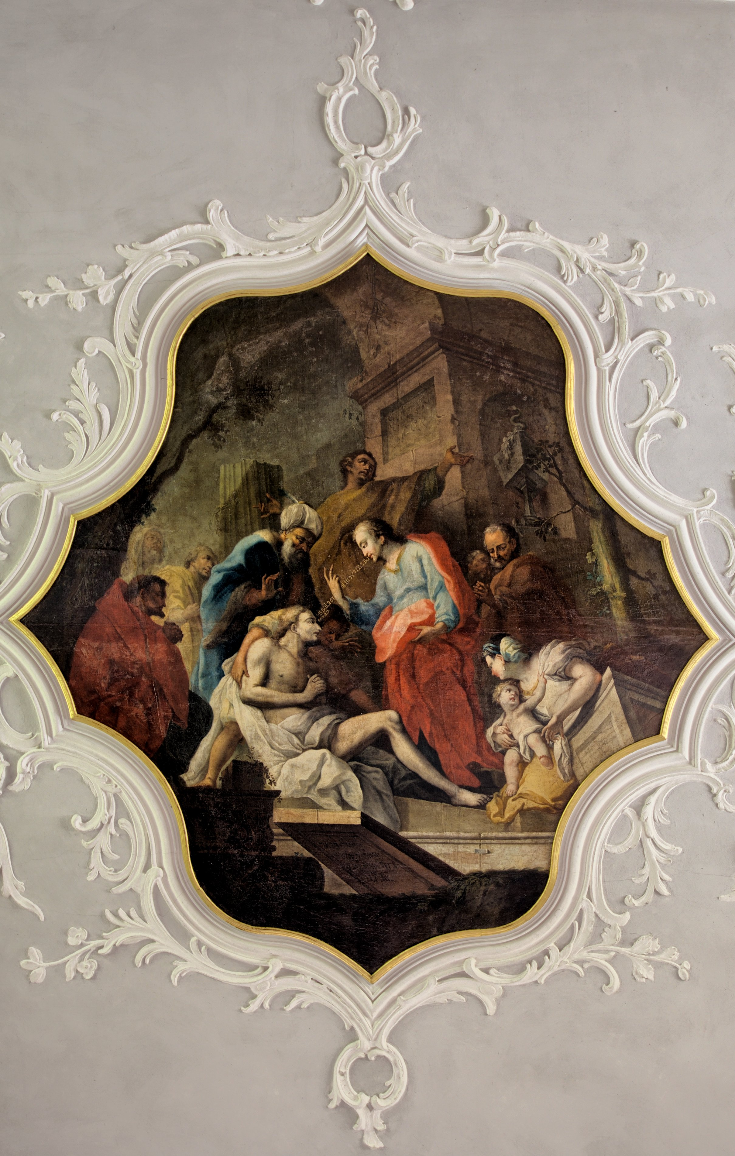 Bilder des Innenraums der St. Michaelskapelle auf dem alten Friedhof in Freiburg